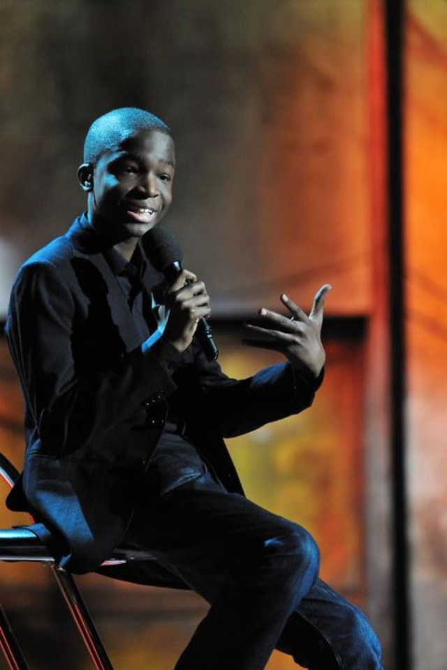 Humoriste